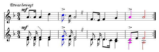 Moll-Version von "Gaudeamus igitur" von 1717 nach Walther Hensels Liederbuch „Das Aufrecht Fähnlein“